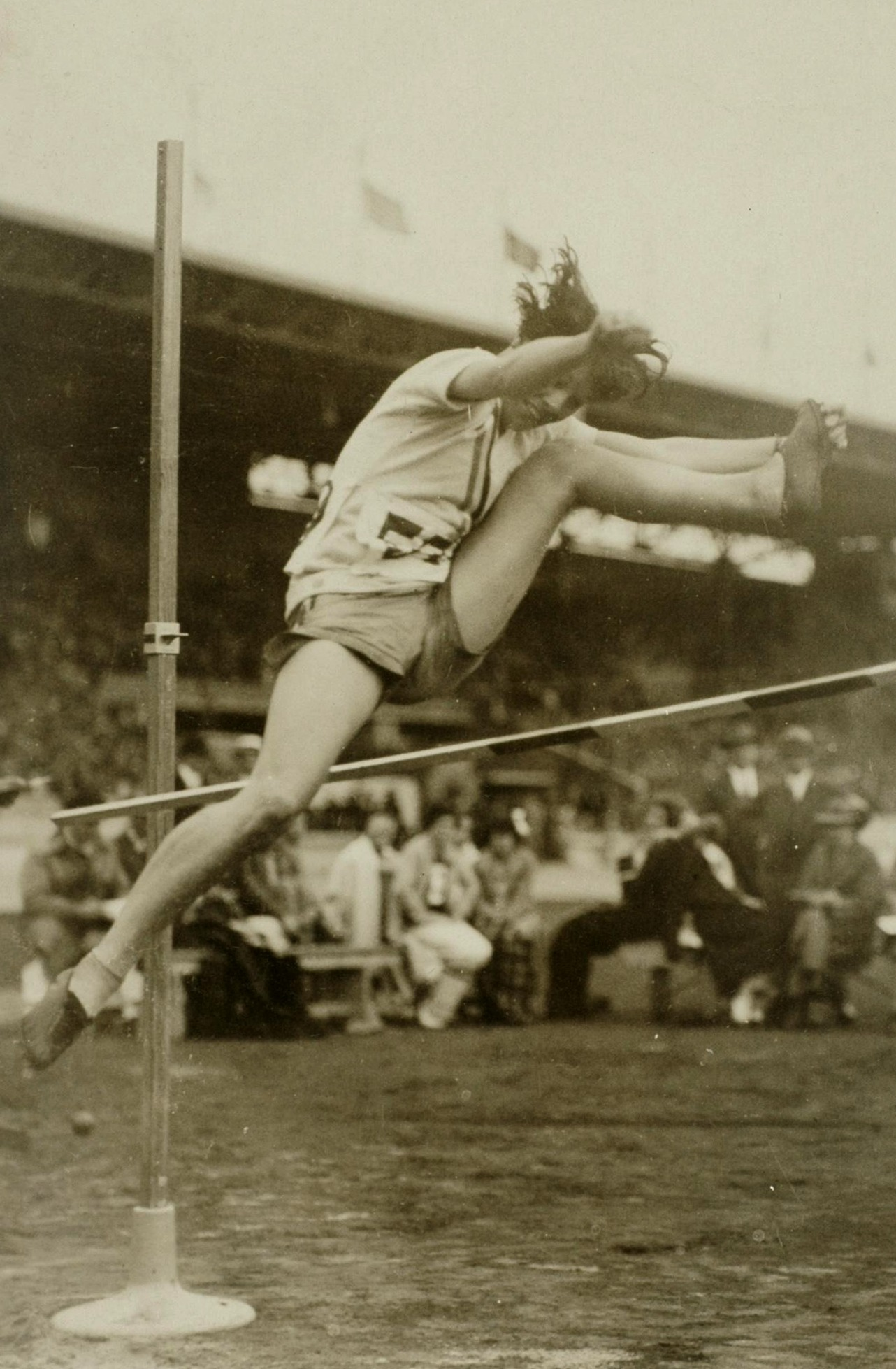 Sport. Sport, Olympische Spelen Amsterdam, 1928 : De Amerikaanse hoogspringer M.O. Wiley in actie.